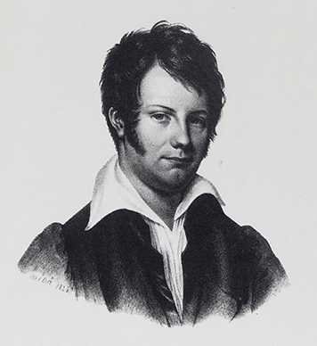 Edgar Quinet jeune.